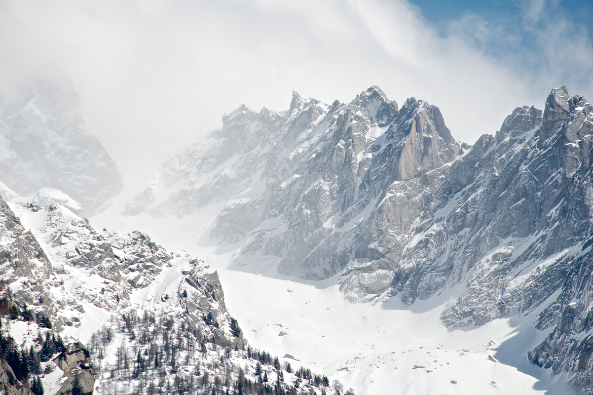 Monti innevati tra le nubi a San Martino, nella val Masino.